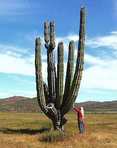 Pachycereus pringlei, cardón, espècie endèmica de Baixa Califòrnia, Baixa Califòrnia Sud i Sonora (Mèxic)